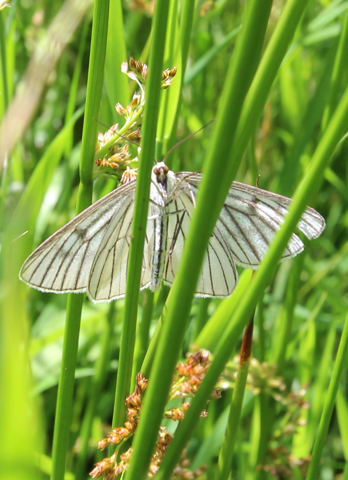 54597 Ormont, südlich von Ort, Flur „Im Bragphenn“. Flächenhaftes Naturdenkmal, ca. 11 ha; Hochmoor. Hartheu-Spanner (Siona lineata) zwischen Flatter-Binse (Juncus effusus). Aufnahme von 2017.